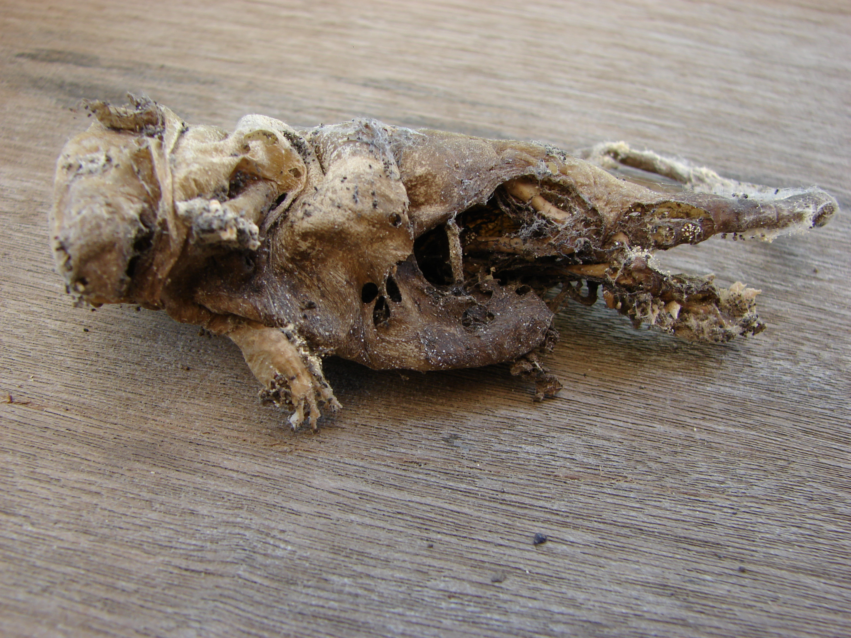 Sourie momifiée